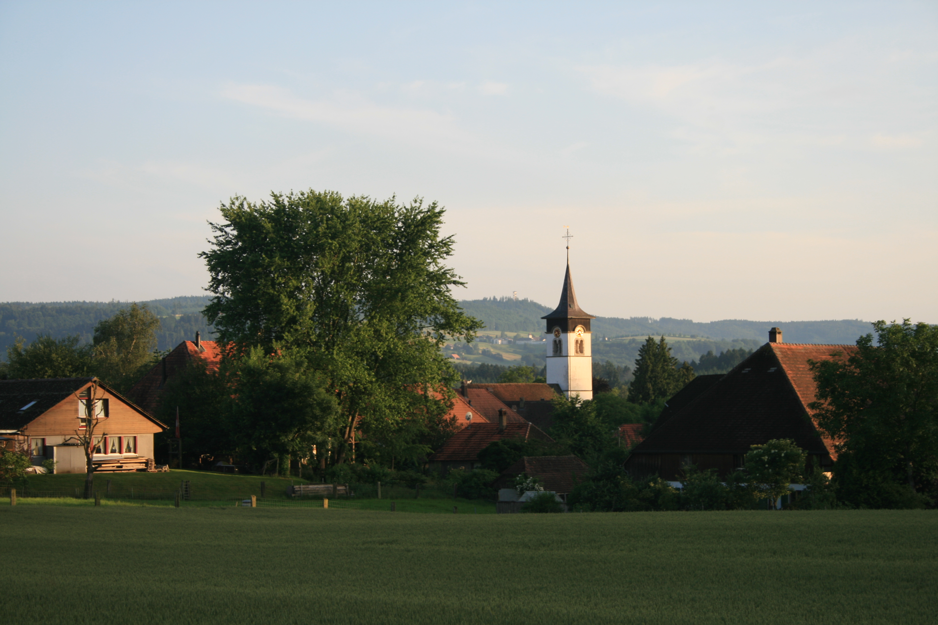 Grossaffoltern